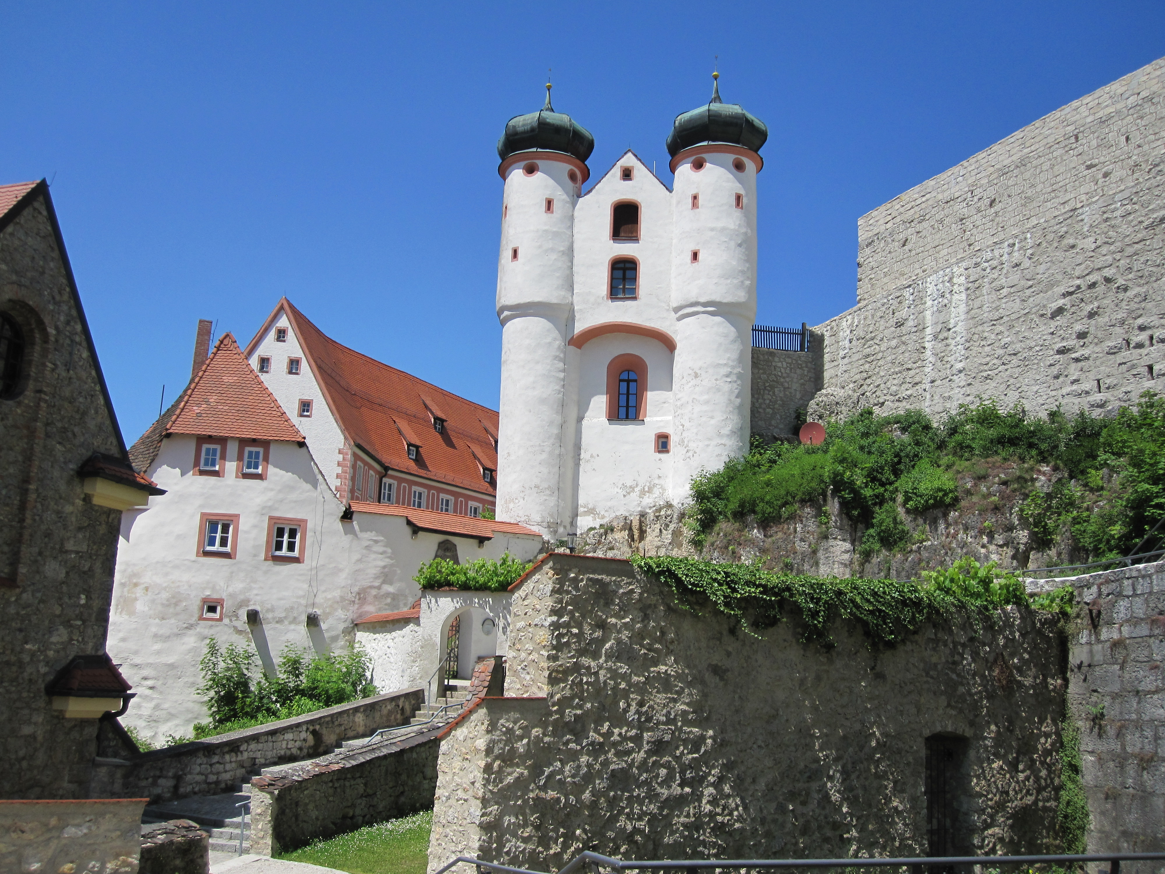 Außenansicht der Burg Parsberg